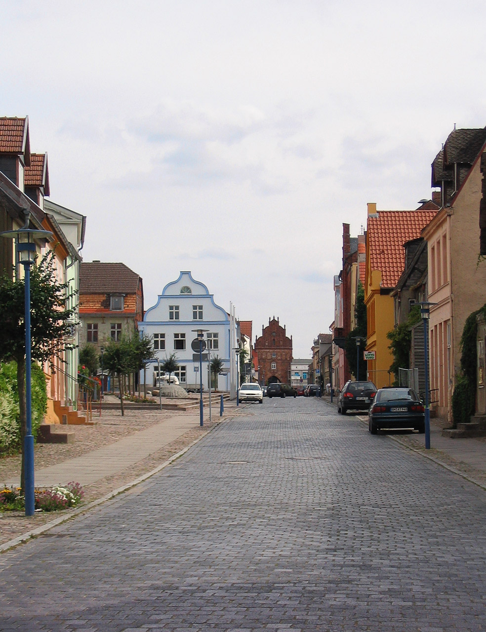 Beschreibung: Tribsees - Hauptstraße - im Hintergrund das Steintor Fotograf: Darkone, 23. August 2004